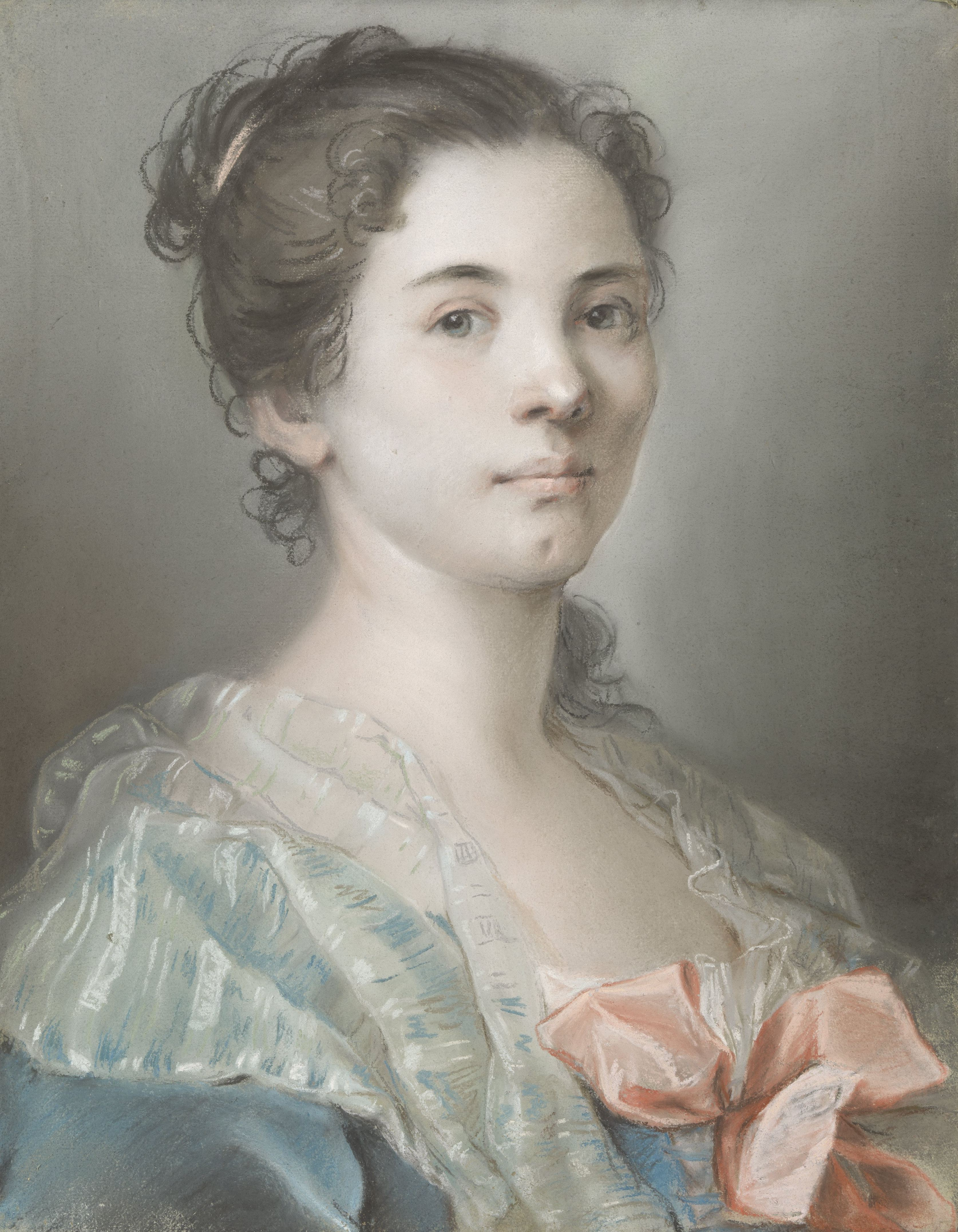 IdentificatieTitel(s): Portret van een jonge vrouwObjecttype: pastel tekening Objectnummer: SK-A-2119Opschriften / Merken: inscriptie, achterzijde: ‘Peinte par Madeleine Basseporte 1727’Omschrijving: Portret van een jonge vrouw. Buste naar rechts, aanziend. Onderdeel van de collectie pastels.VervaardigingVervaardiger: tekenaar: Madeleine Françoise Basseporte (vermeld op object)Datering: 1727Fysieke kenmerken: pastelMateriaal: papier Afmetingen: h 44,5 cm. × b 37 cm. OnderwerpWat: anonymous historical person portrayed - BB - womanVerwerving en rechtenVerwerving: aankoop 30-apr-1900Copyright: Publiek domein